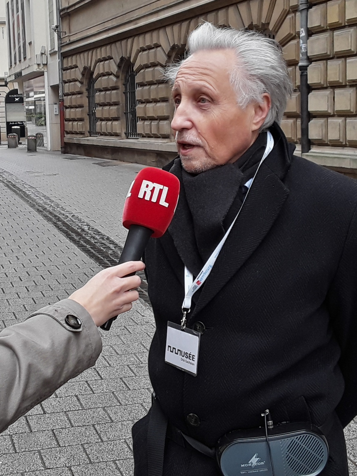 Interview mam Robert L. Philippart um Piquet (rue de la Poste) an der Stad